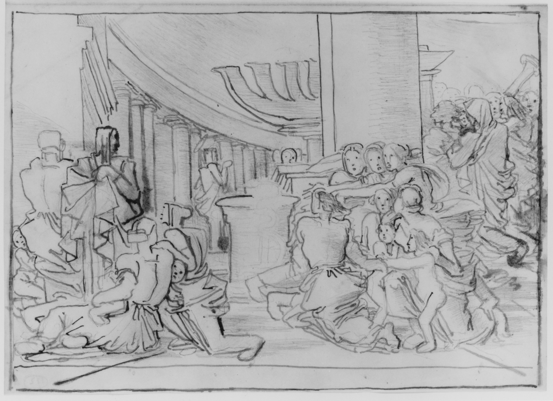 Drawing; Drawings